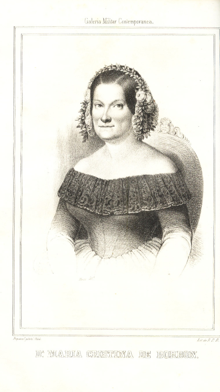 María Cristina de Borbón. "Galería Militar Contemporánea". Madrid 1846